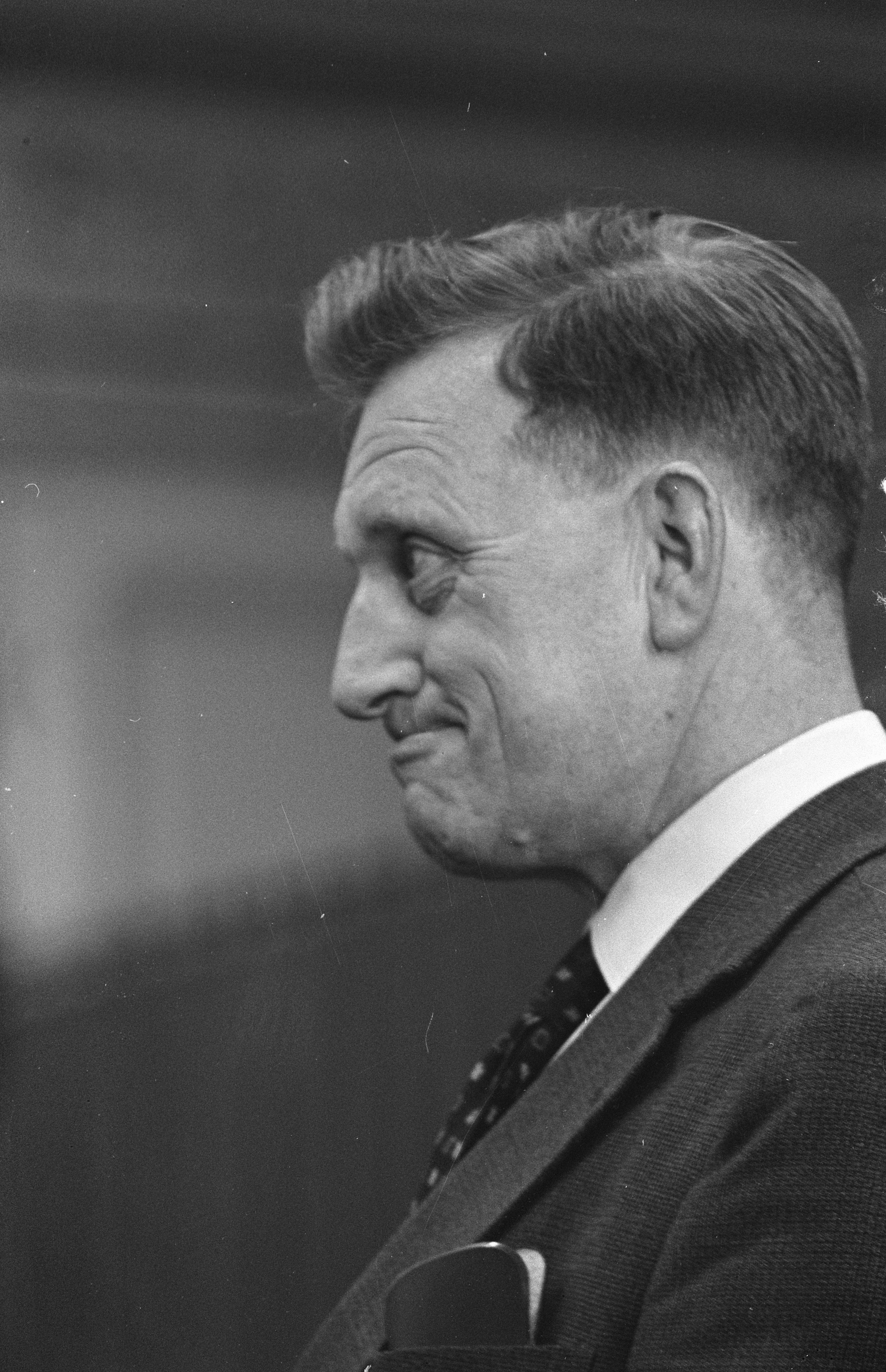 Collectie / Archief : Fotocollectie Anefo Reportage / Serie : [ onbekend ] Beschrijving : Debatten in de Tweede kamer over het huur en loonbeleid der regering, Oud Minister Suurhoff (PvdA) plaatst een interruptie Datum : 14 juli 1959 Locatie : Den Haag, Zuid-Holland Trefwoorden : parlementaire debatten, parlementariërs Persoonsnaam : Suurhoff, J.G. Fotograaf : Pot, Harry / Anefo Auteursrechthebbende : Nationaal Archief Materiaalsoort : Negatief (zwart/wit) Nummer archiefinventaris : bekijk toegang 2.24.01.05 Bestanddeelnummer : 910-5258